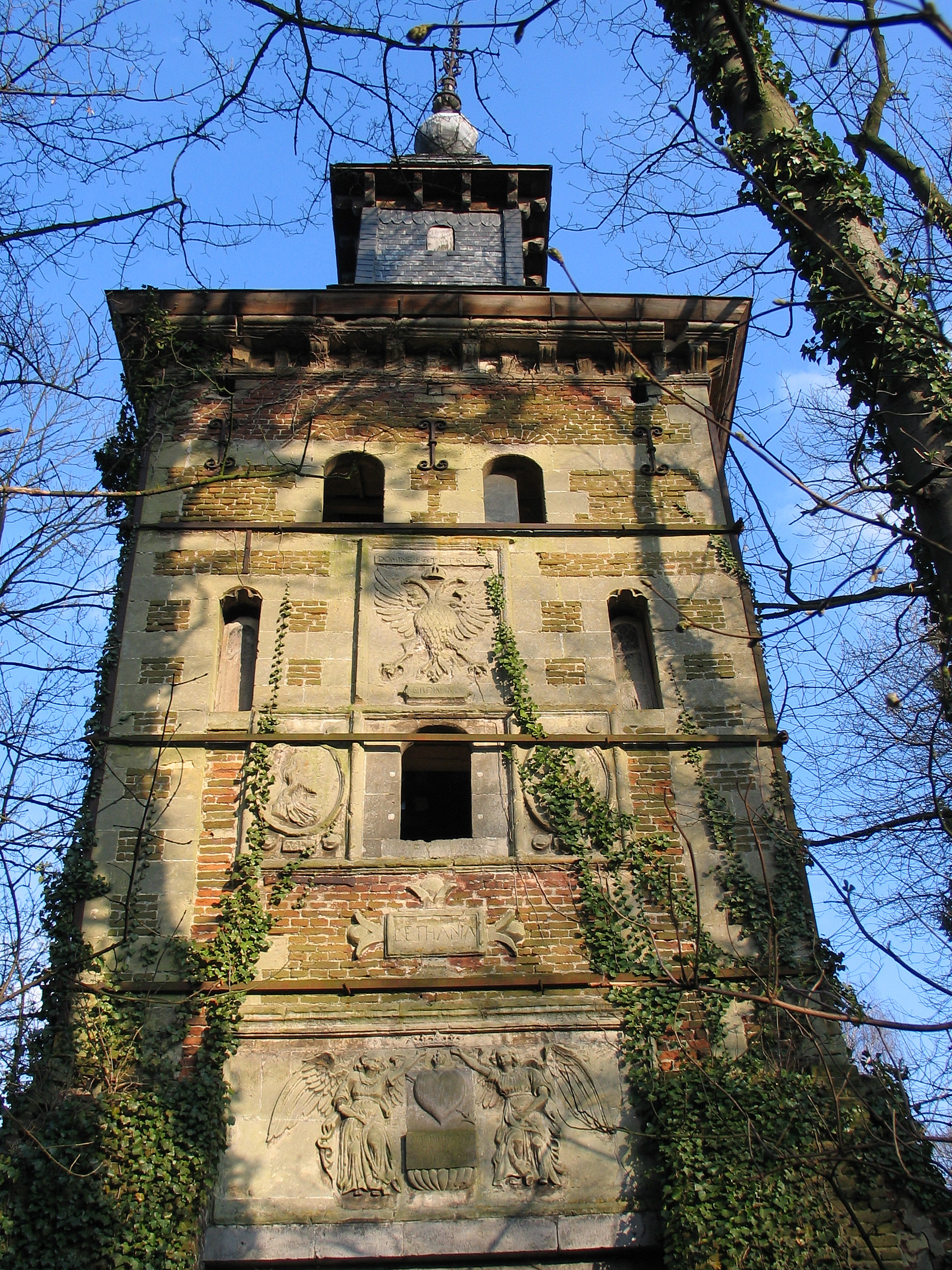 Bethaniakasteel te Hoeselt, België